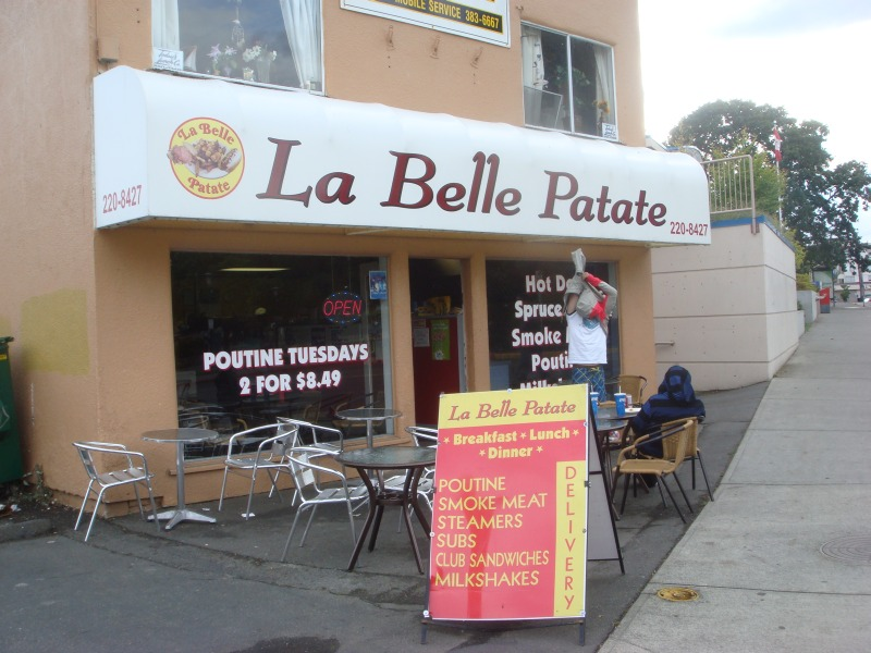 Restaurant La Belle Patate de Victoria, Colombie-Britannique.